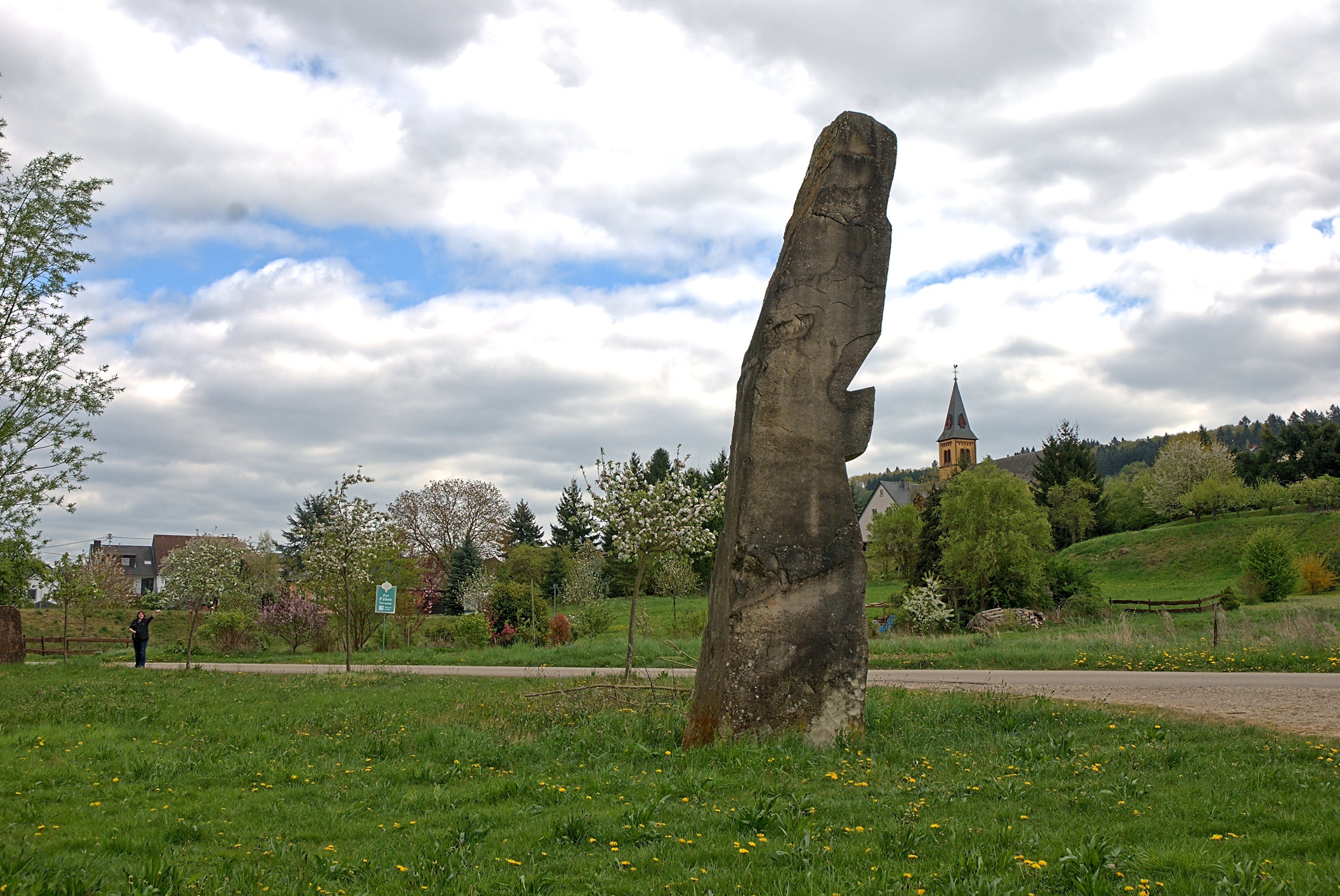 Georg Ahrens (Bildhauer): Engel Nr. 16 (1999). Udelfanger Sandstein, 7 m hoch. Standort: Moselufer, Oberbillig. Die Skulptur wurde versetzt, da sie am Originalstandort einem Biergarten weichen musste und steht jetzt ein paar Meter moselaufwärts vom "Zusammengefügten Standstein"